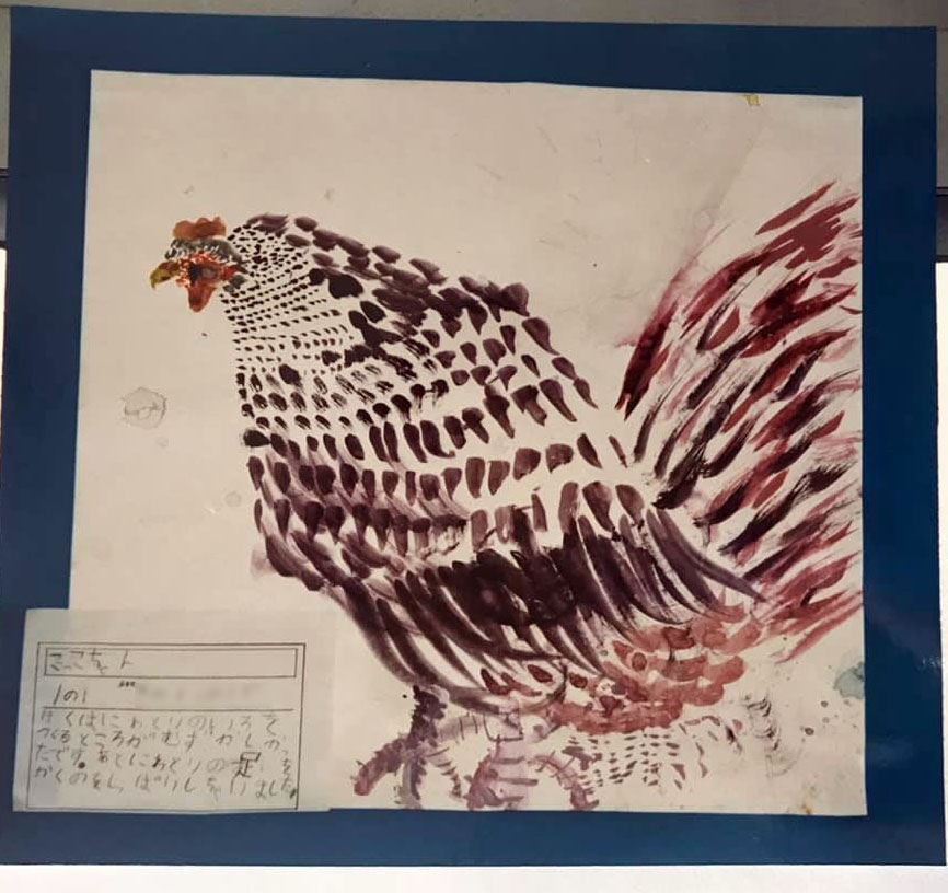 キミ子方式で描いたニワトリの絵。1997年の小学校1年生の作品。 A picture of a chicken drawn by Kimiko-method in 1997.This is a work that is painted by a student who is the 1st grade of elementary school in Japan.